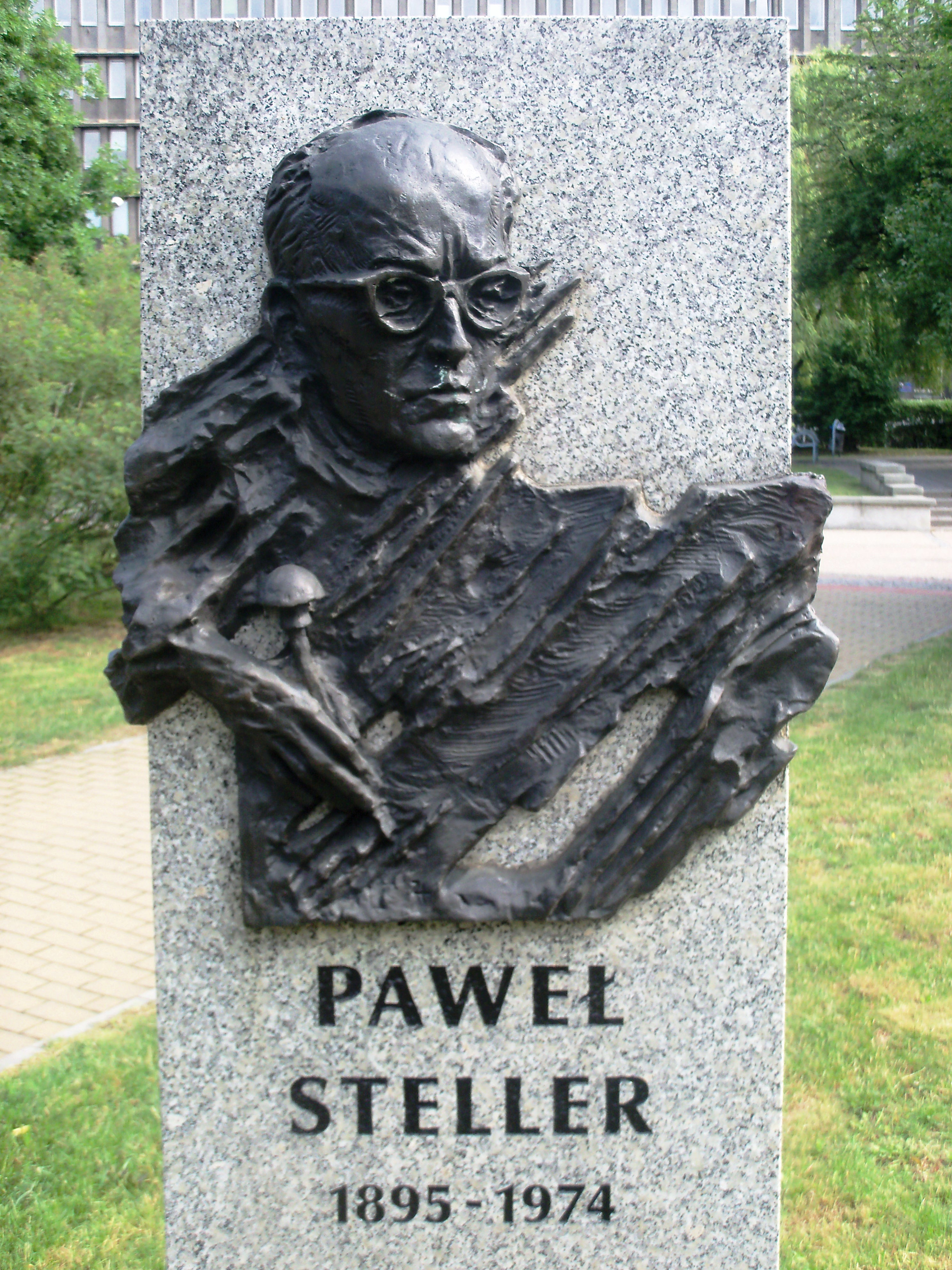 Galeria Artystyczna na placu Grunwaldzkim w Katowicach: Rzeźba przedstawiająca Pawła Stellera